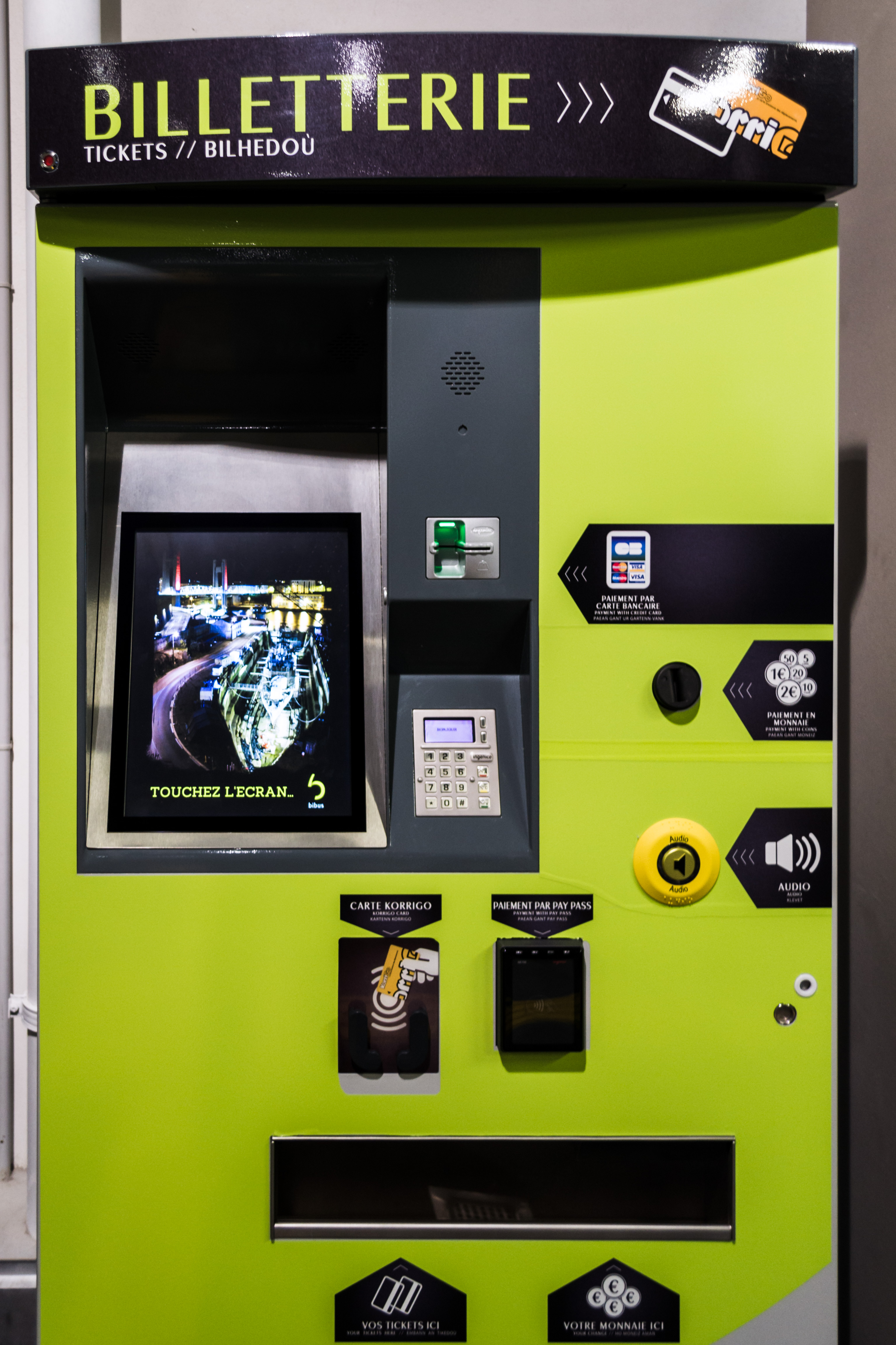 Distributeur automatique Bibus de la station de téléphérique Les Capucins à Brest.